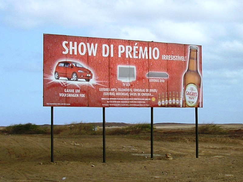 Billboard, Sal island, Cape Verde